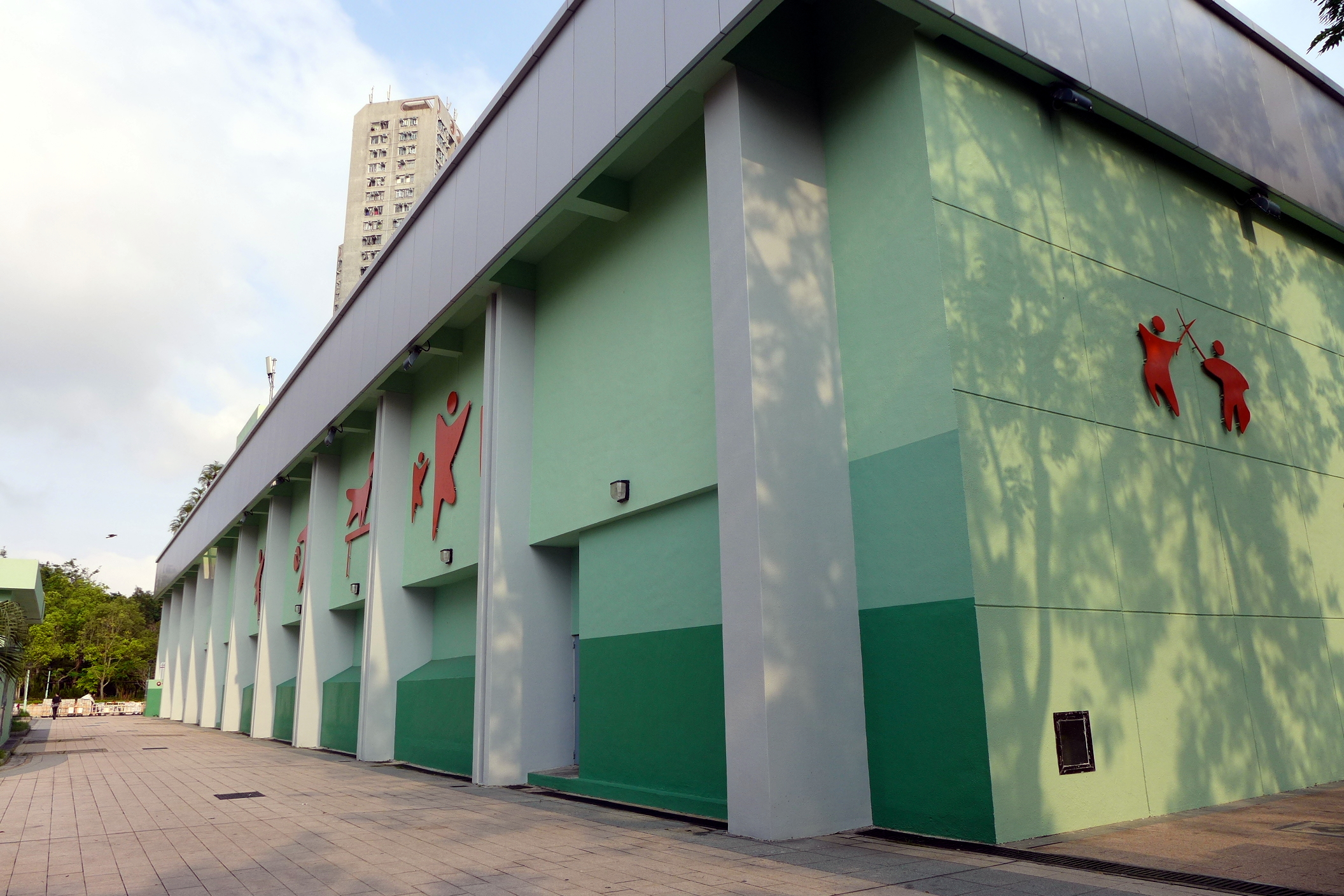 Lung Sum Avenue Sport Centre, Sheung Shui